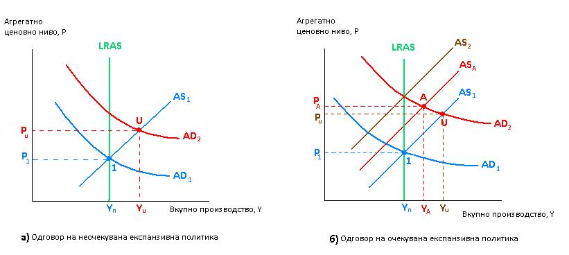 Експанзивната политика што ја поместува кривата на агрегатна побарувачка има поголем ефект врз производството кога е неочекувана, отколку кога е очекувана. Кога експанзивната политика е неочекувана - дел а), краткорочната крива на агрегатна понуда не се поместува, а економијата се движи до точка U, така што вкупното производство и ценовното ниво се зголемуваат. Кога политиката е очекувана - дел б), краткорочната крива на агрегатната понуда се поместува до ASA заради нефлексибилноста на целосното приспособување на платите и цените, движејќи ја економијата до точката A, каде што вкупното производство расте помалку од YU, a ценовното ниво расте повеќе од PU.